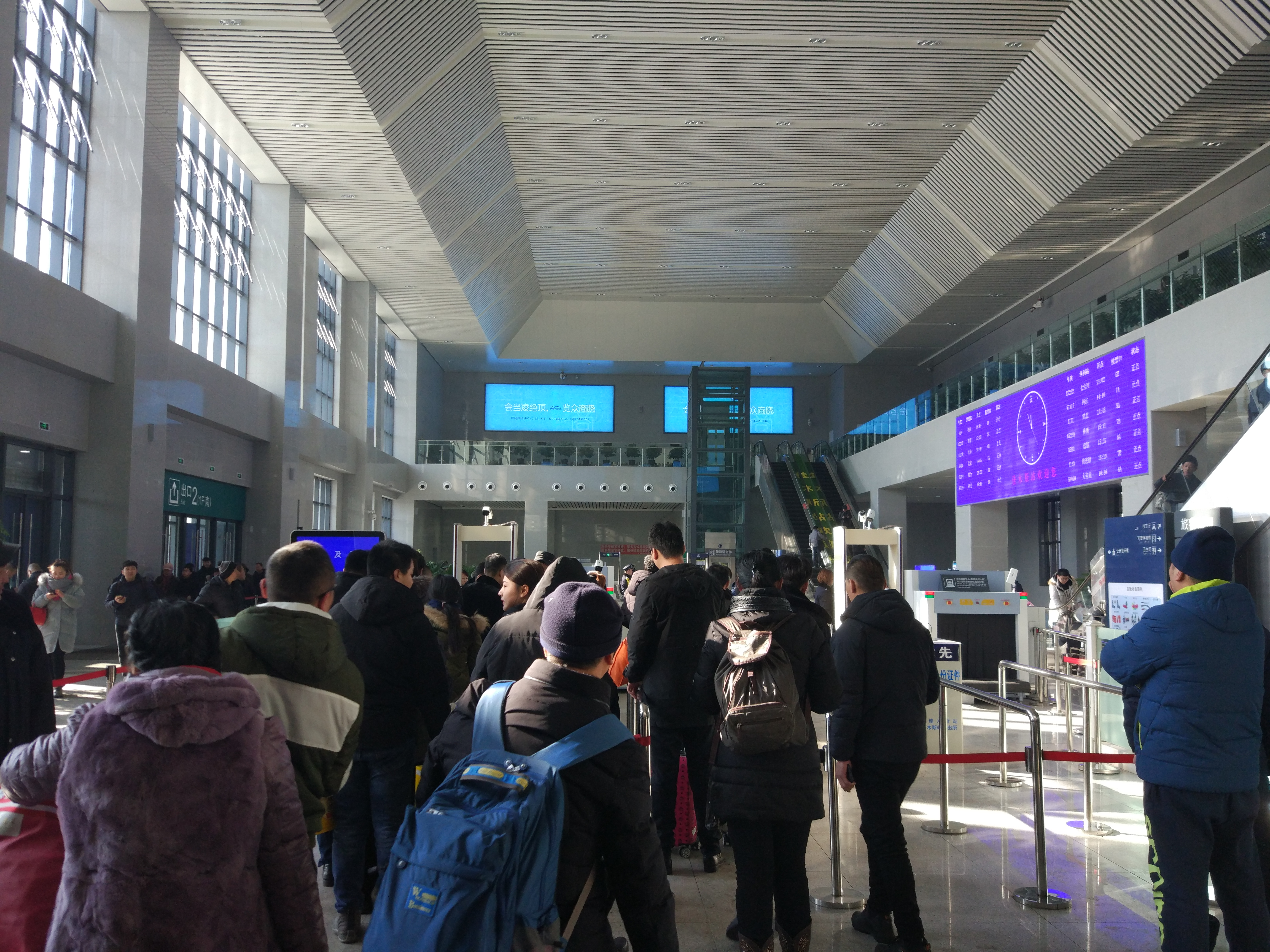 佳木斯火车站南站房内部，摄于2018年2月。